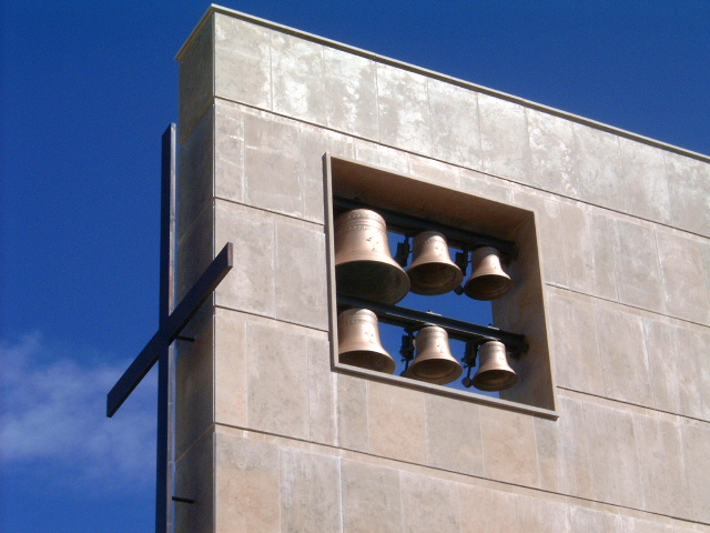 Descrição: Pormenor da igreja de Carvalhal